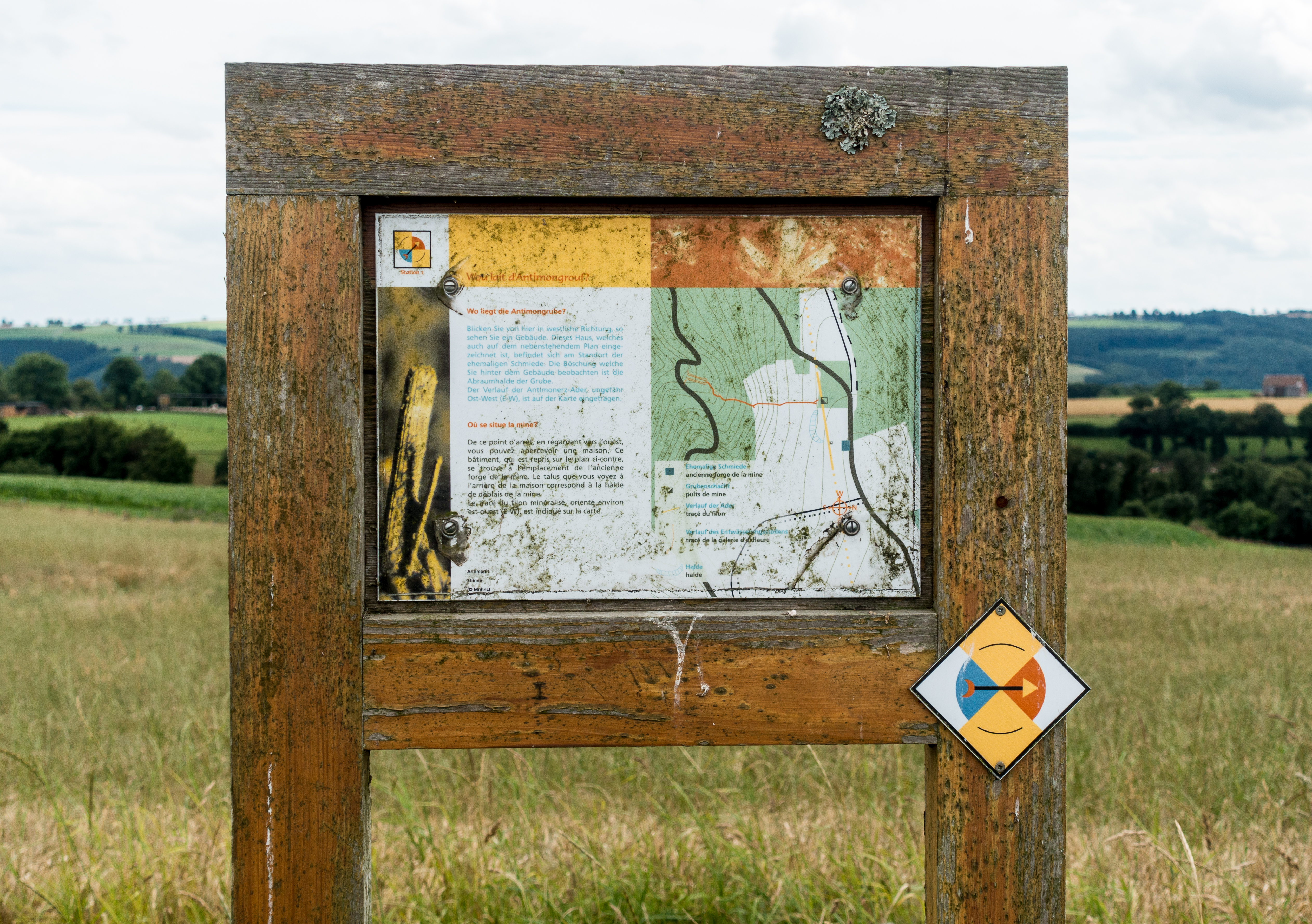 Um Léierpad vun der Géisdrefer Antimongrouf.